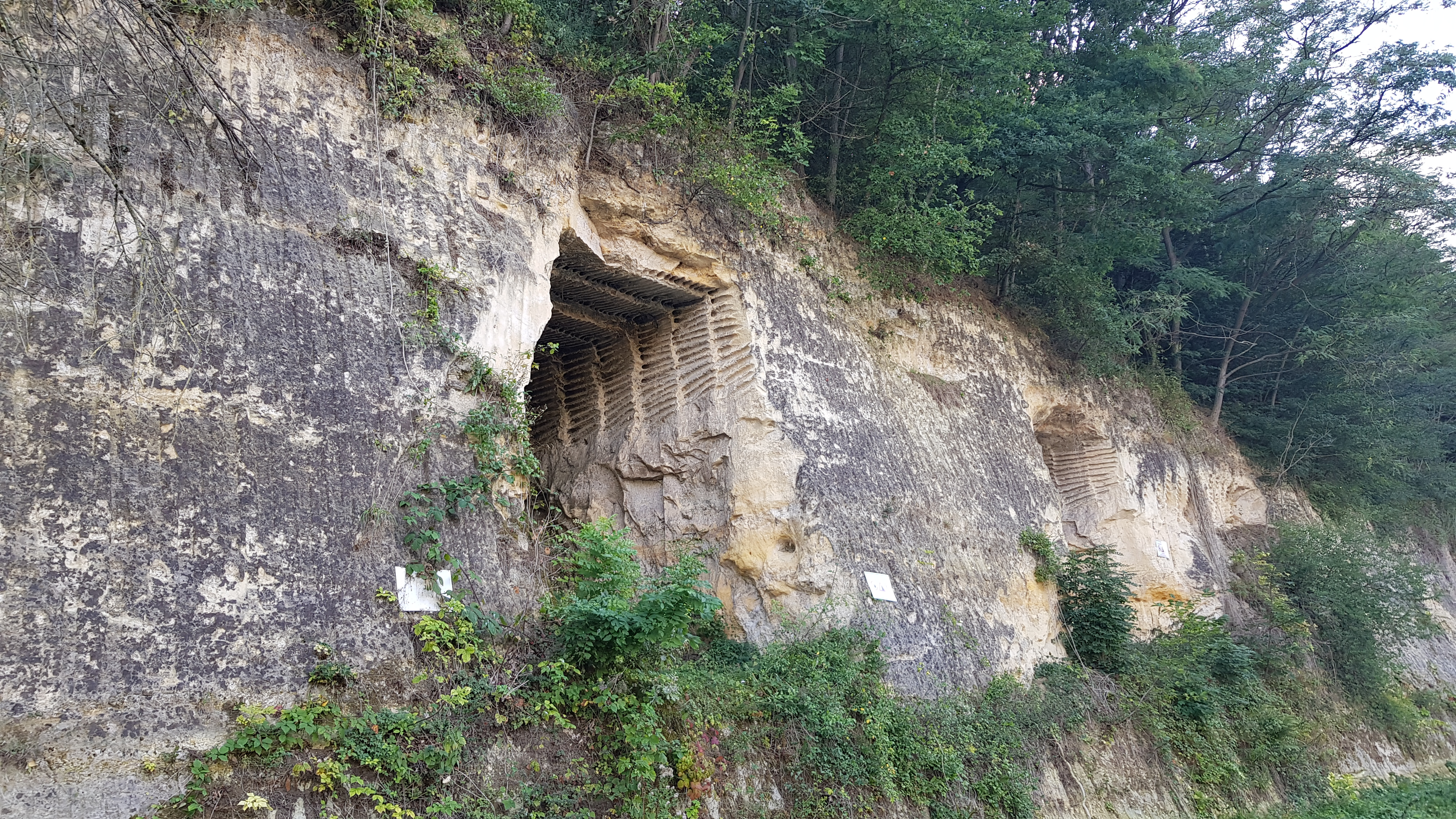 Groeve Mathus, Kanne, België